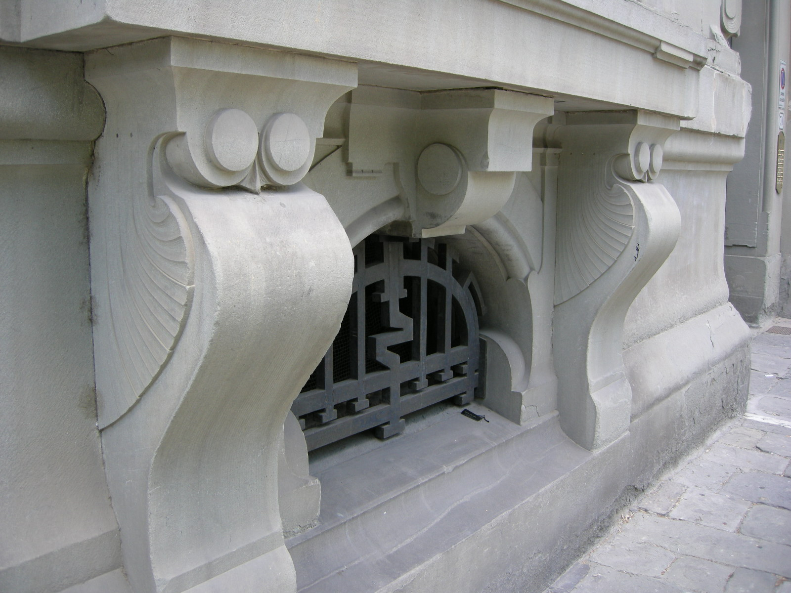 Villa uzielli, dettaglio 02 gufi